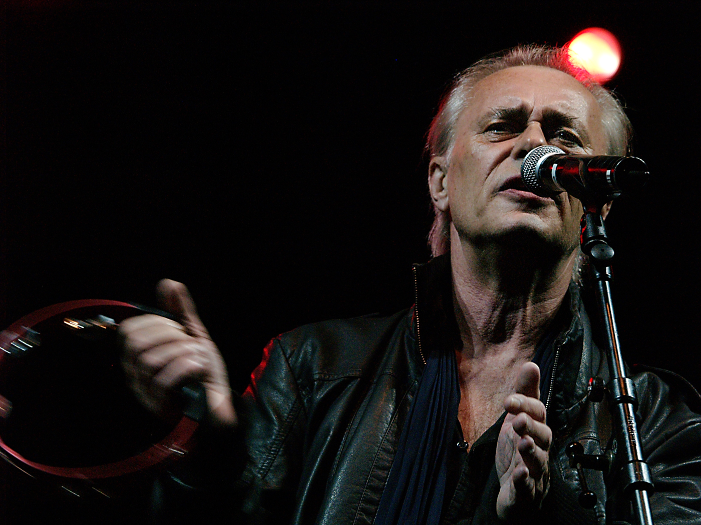 Lift (unplugged) in Concert - Smurfit Kappa - Mitarbeiterfest 2010 - Werther Lohse - Sänger und Schlagzeuger von Lift in Action